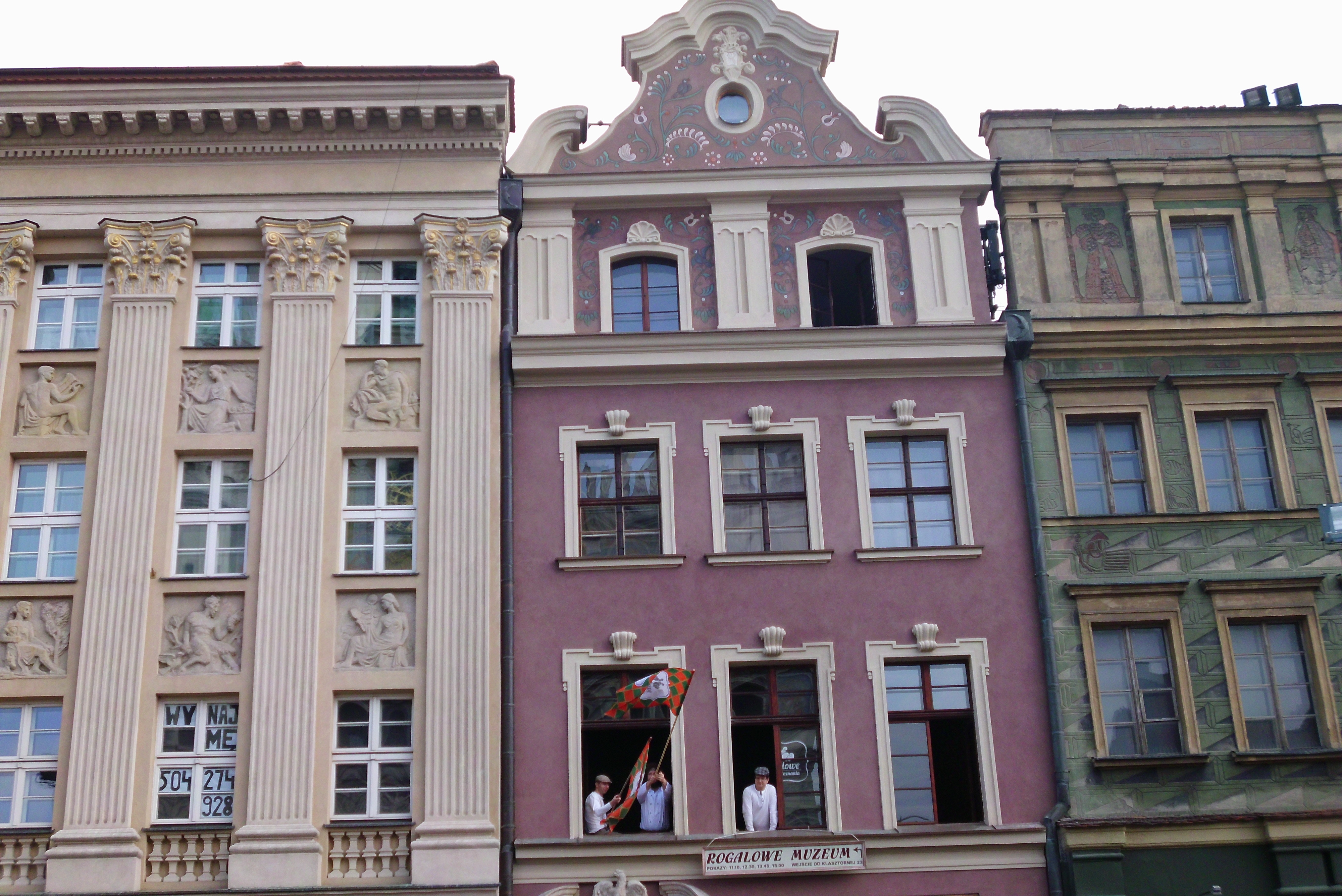 Rogalowe Muzeum Poznania - marzec 2015